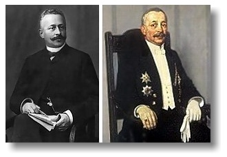 Otto Beutler, Bürgermeister von Dresden (gestorben 1926, das Bild entstand, wenn man dem Namen des Ursprungsbild Glauben schenken darf, bereits 1910.)